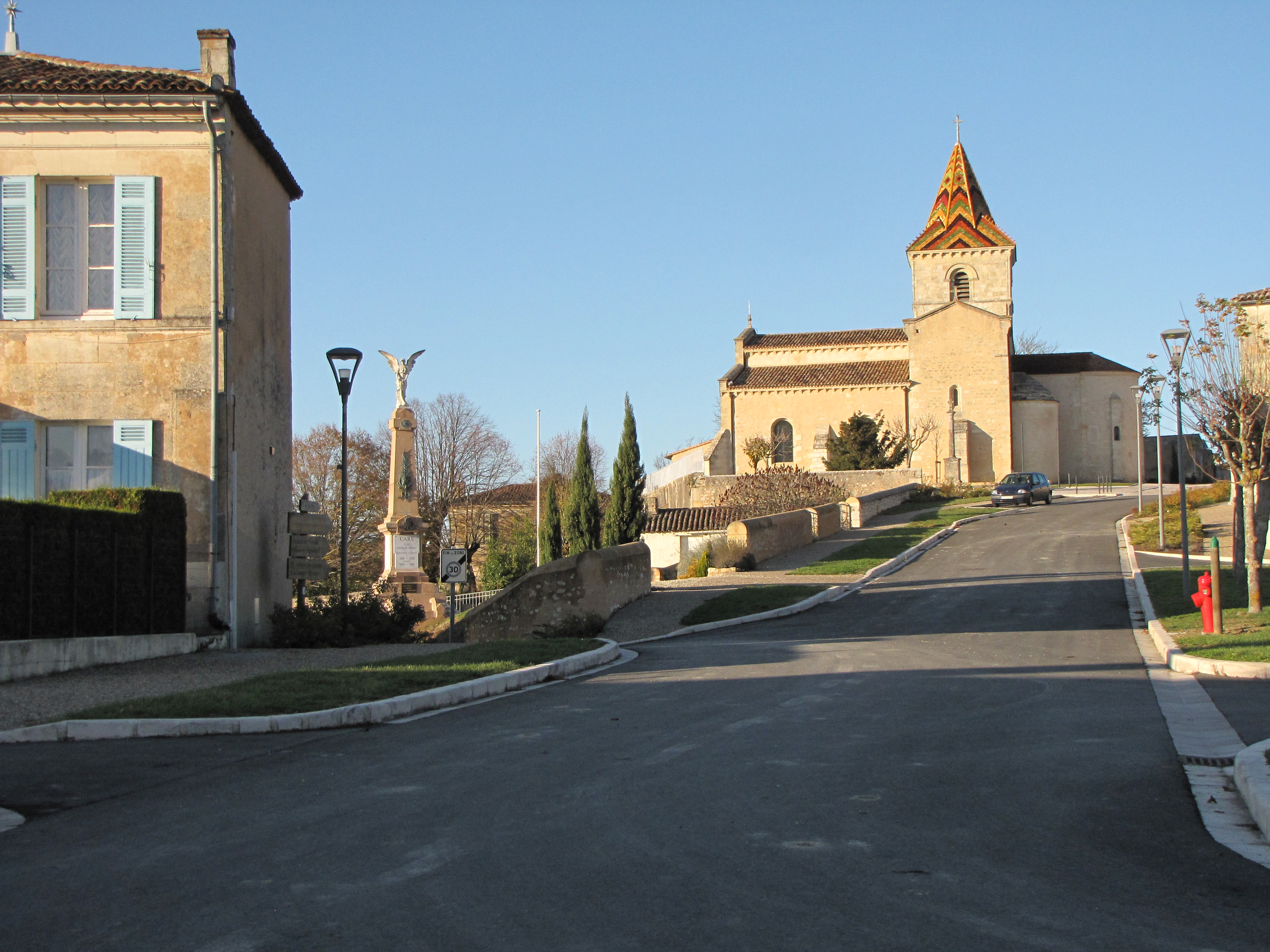 Église Saint-Pierre de Cars